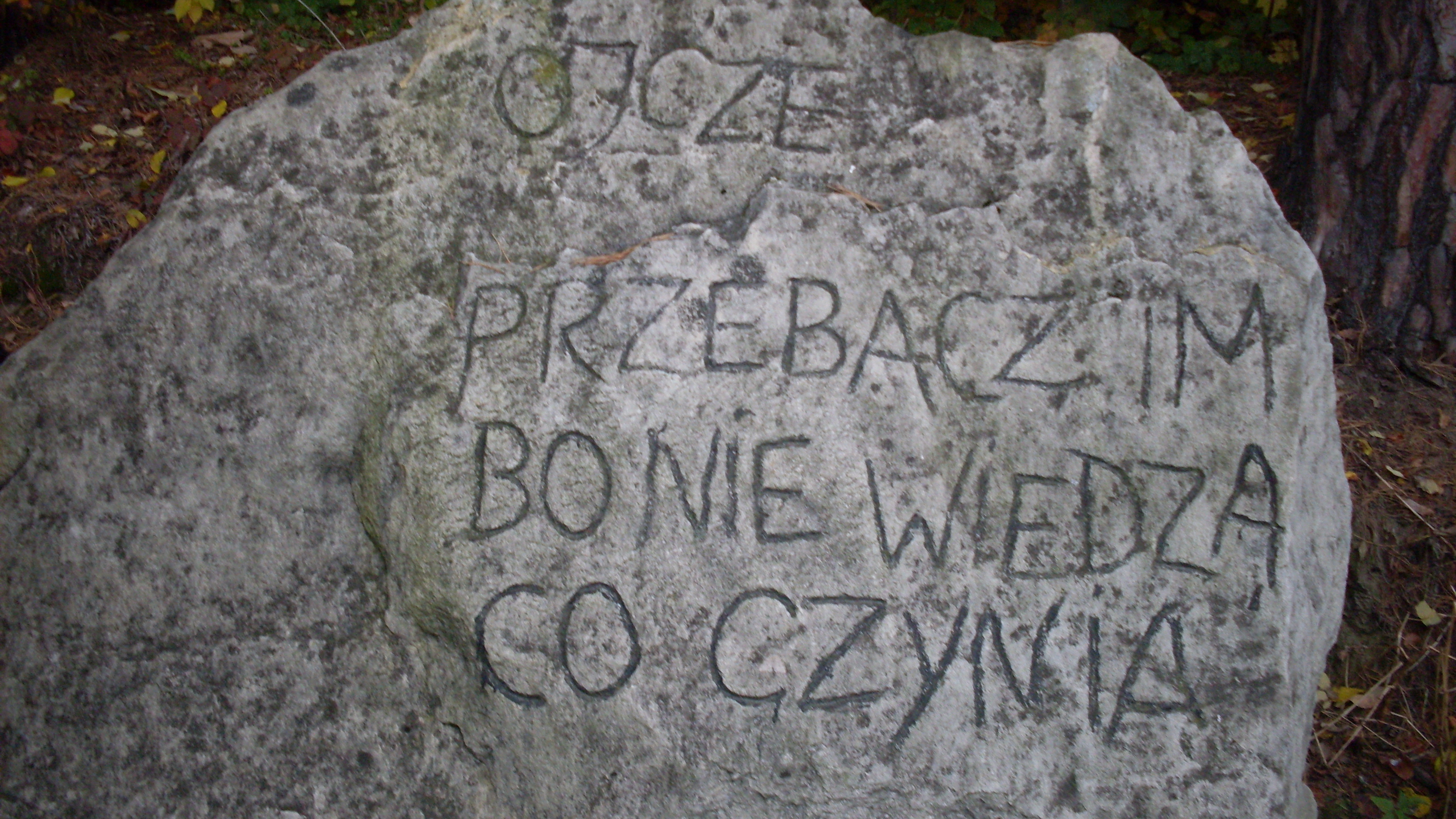 Cytat z Ewangelii Łukasza 23:34 wyryty na głazie w Dolinie Dzwonek (Krzeszowice, os. Żbik)